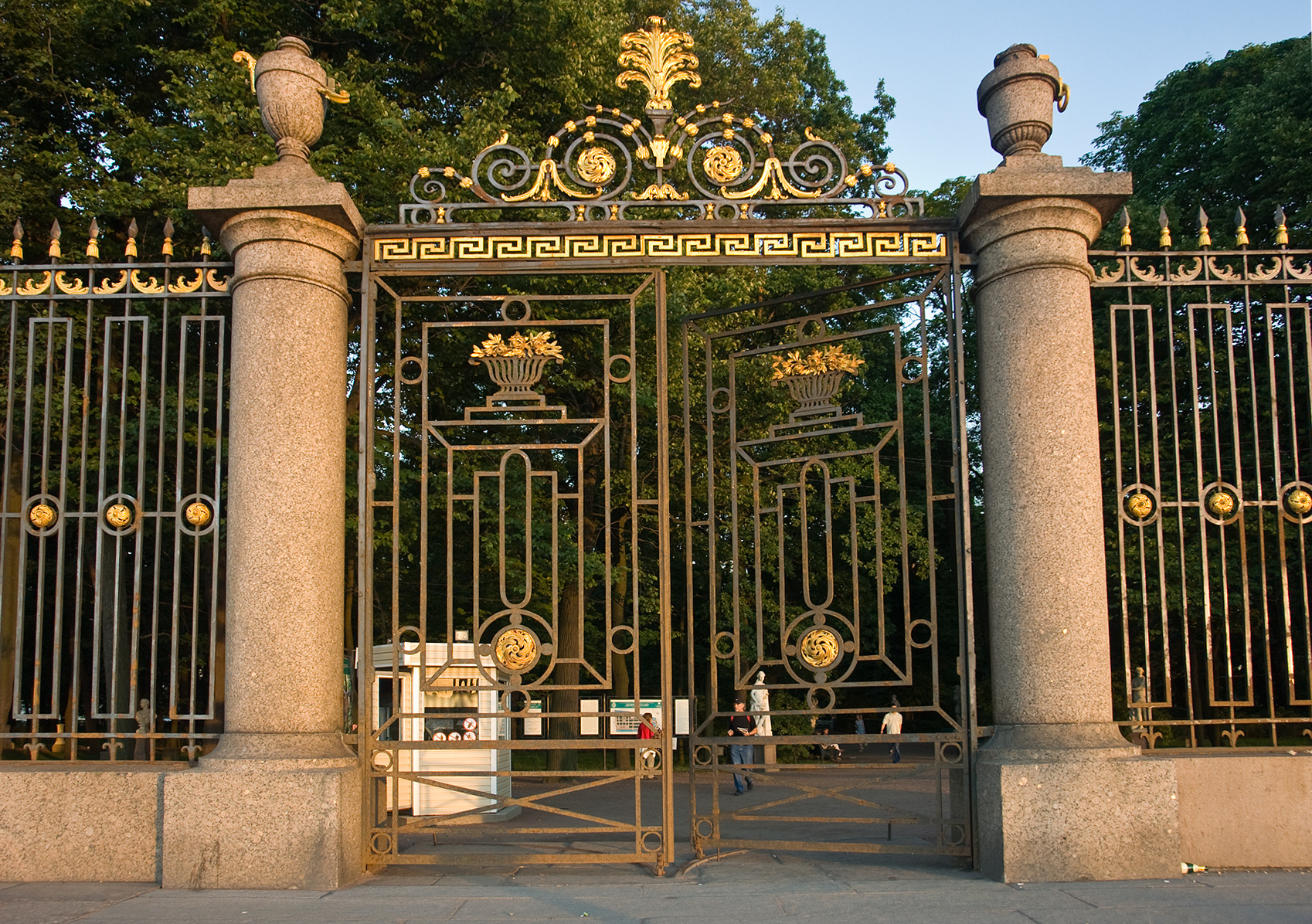 Центральные ворота Летнего Сада (Санкт-Петербург)